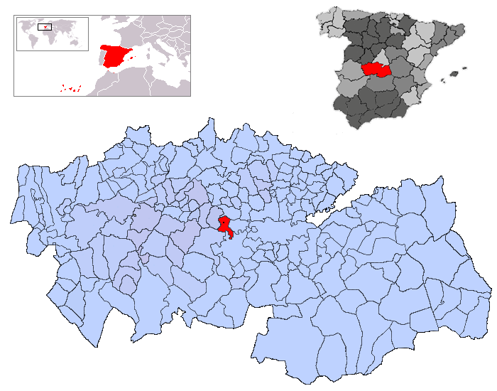 Burujón en la provincia de Toledo